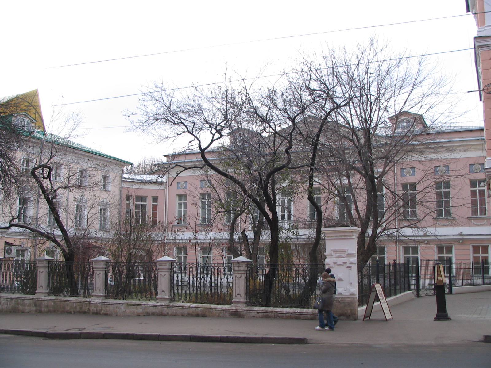 Petrovka Street, 23. Moscow